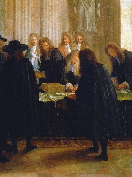 Extrait du tableau de Louis XIV tenant les sceaux en présence des conseillers d’État et des maîtres des requêtes.